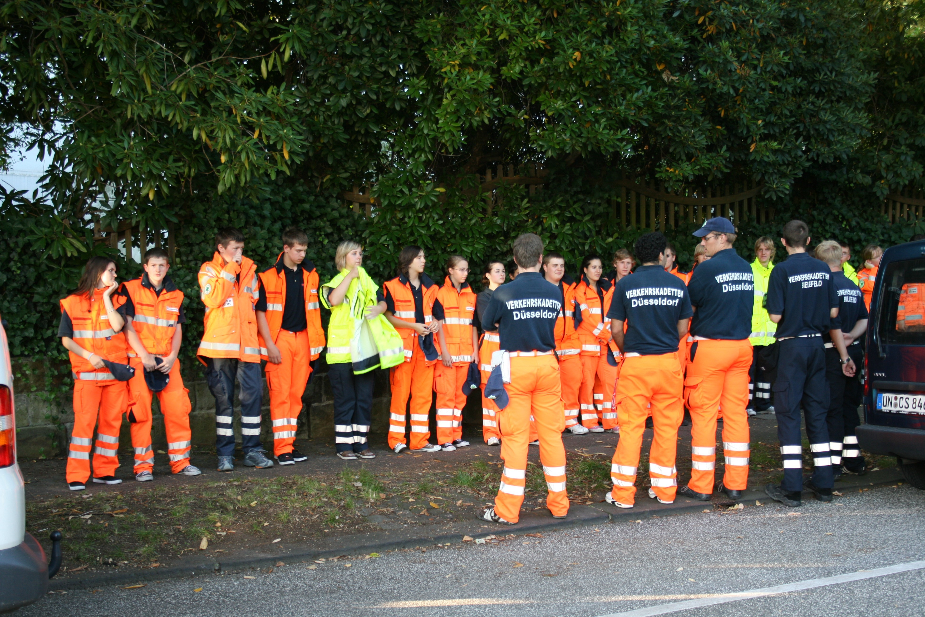 NRW-Tag im Zooviertel von Wuppertal